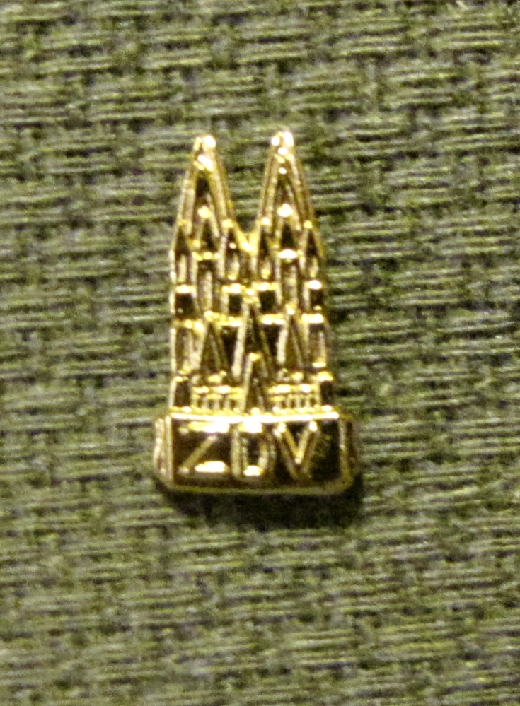 Zentral-Dombau-Verein zu Köln von 1842: Mitgliederbestand rund 17.600. Neu-Mitglieder erhalten eine Anstecknadel des Kölner Doms. Original-Höhe: 13 mm